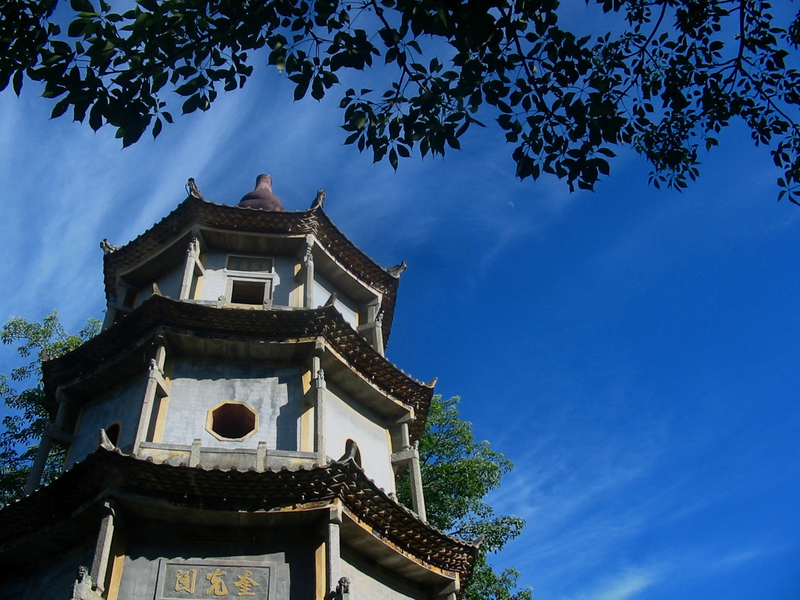 奎光阁